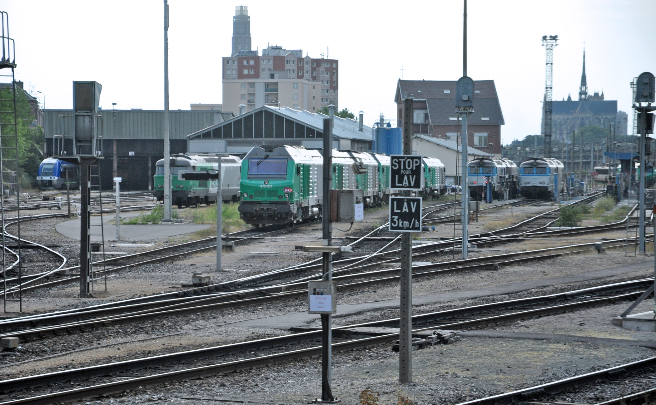 Vue du dépot d'Amiens en provenant de Longueau vers gare d'Amiens